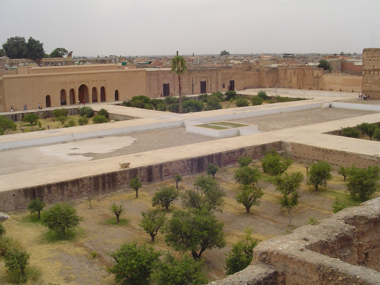 El Baadi palace, Marrakech